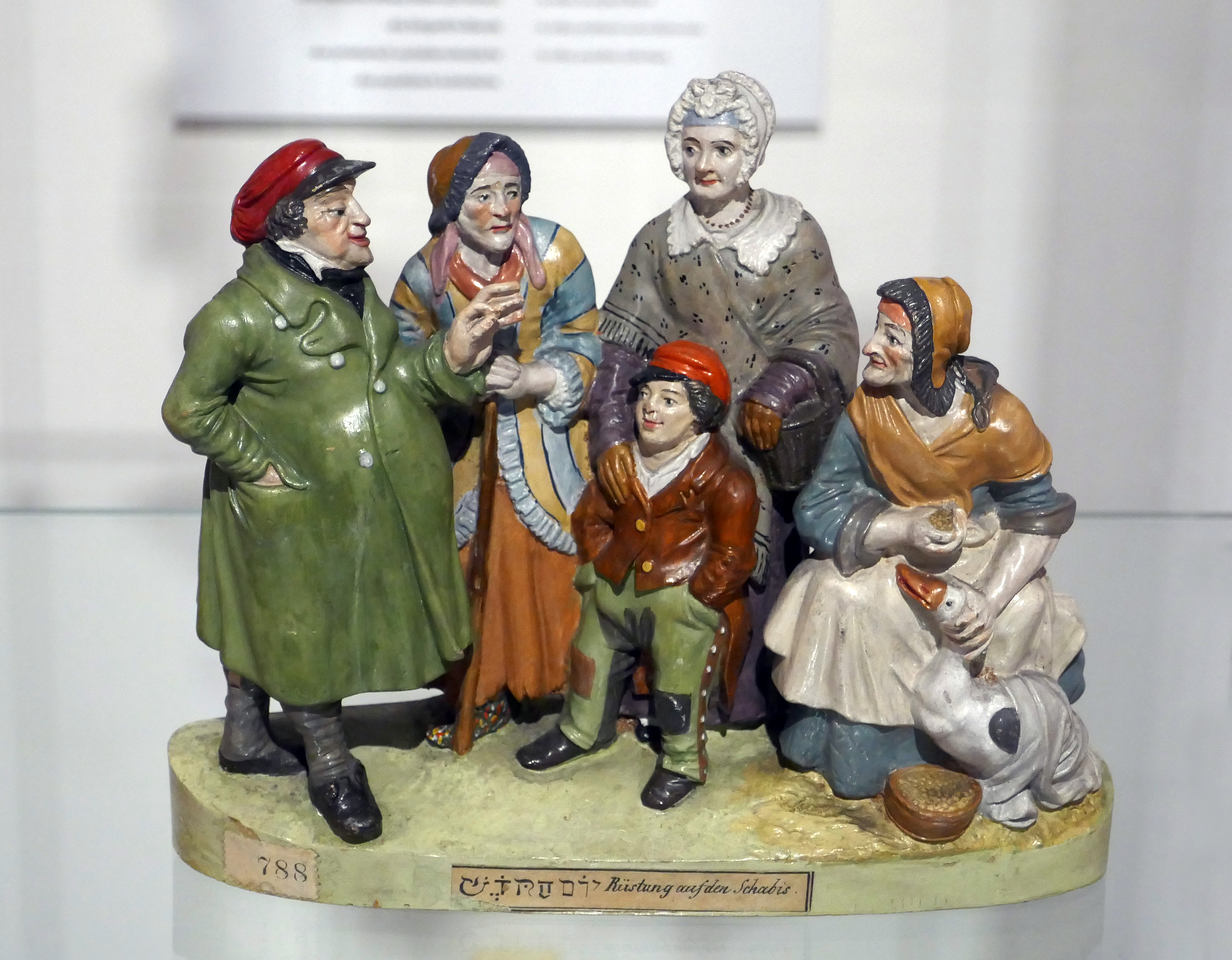 Rüstung auf den Schabbes. Jüdische Familie in zeittypischer Kleidung. Vater, Mutter, Grossmutter, Magd, mit Huhn. 1830/1850. Zizenhauser Terracotta Museum im Ritterhaus (Offenburg).